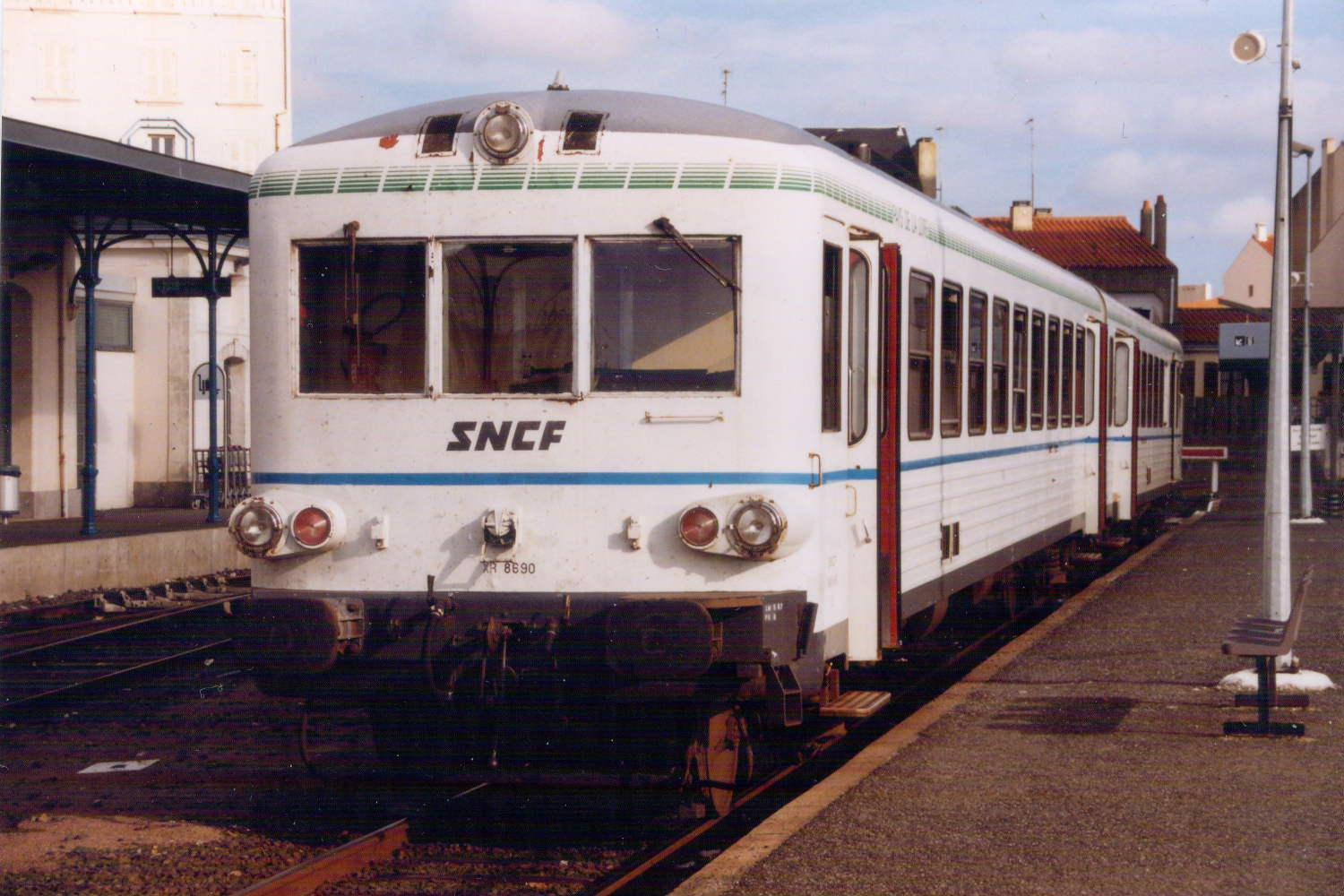 L'X 4693 vu côté remorque XR 8690 en gare des Sables-d'Olonne